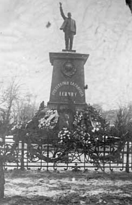 Таганрог. Памятник Ленину 1925 год